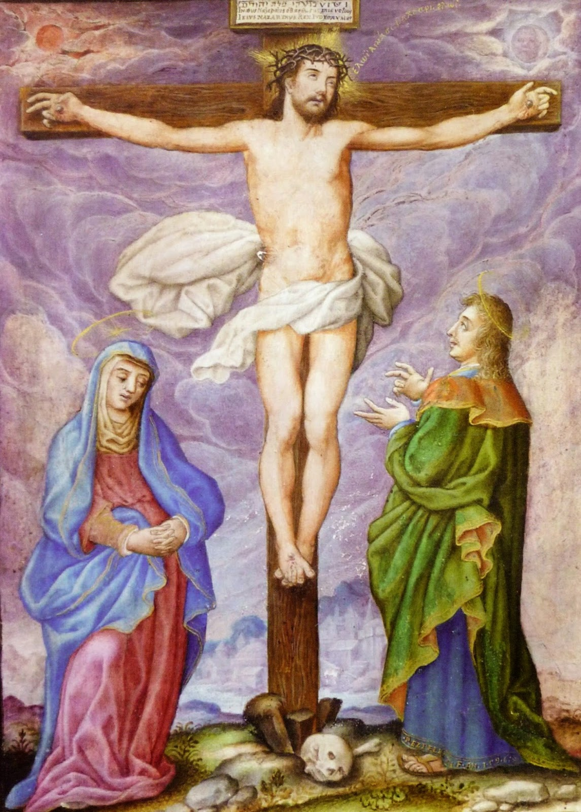 Calvario. firmado P. EZPELETA F. AN: 1596. Londres, colección particular